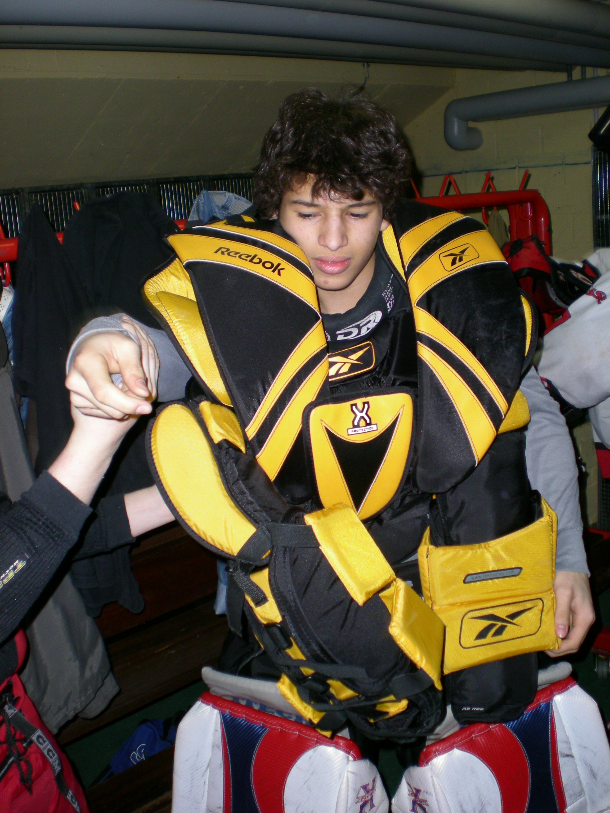 Körperschutz 2